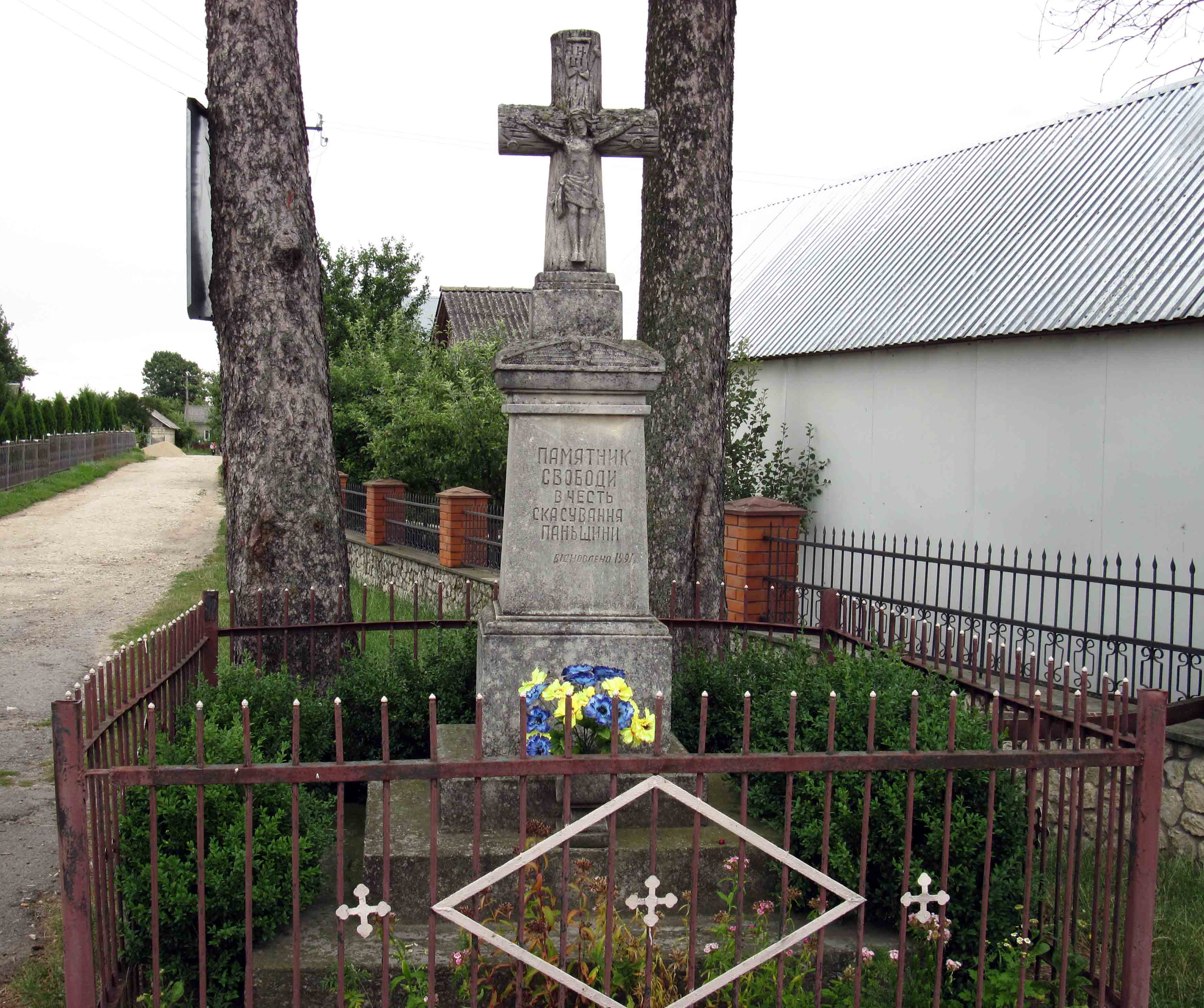 Пам’ятник свободи на честь скасування панщини (відновлений у 1991 р.) у Вертелці Зборівського району Тернопільської області